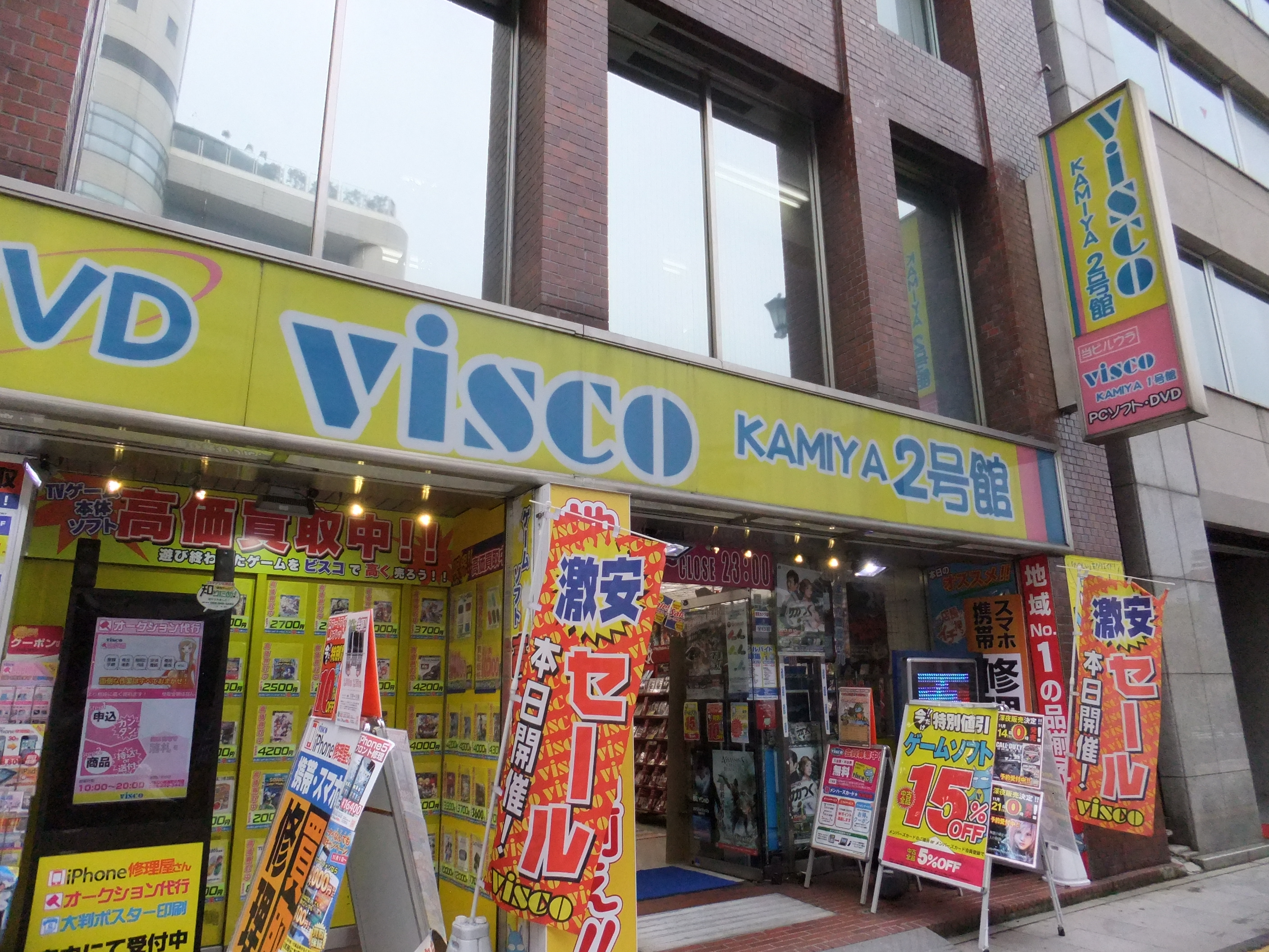 ビスコ広島店